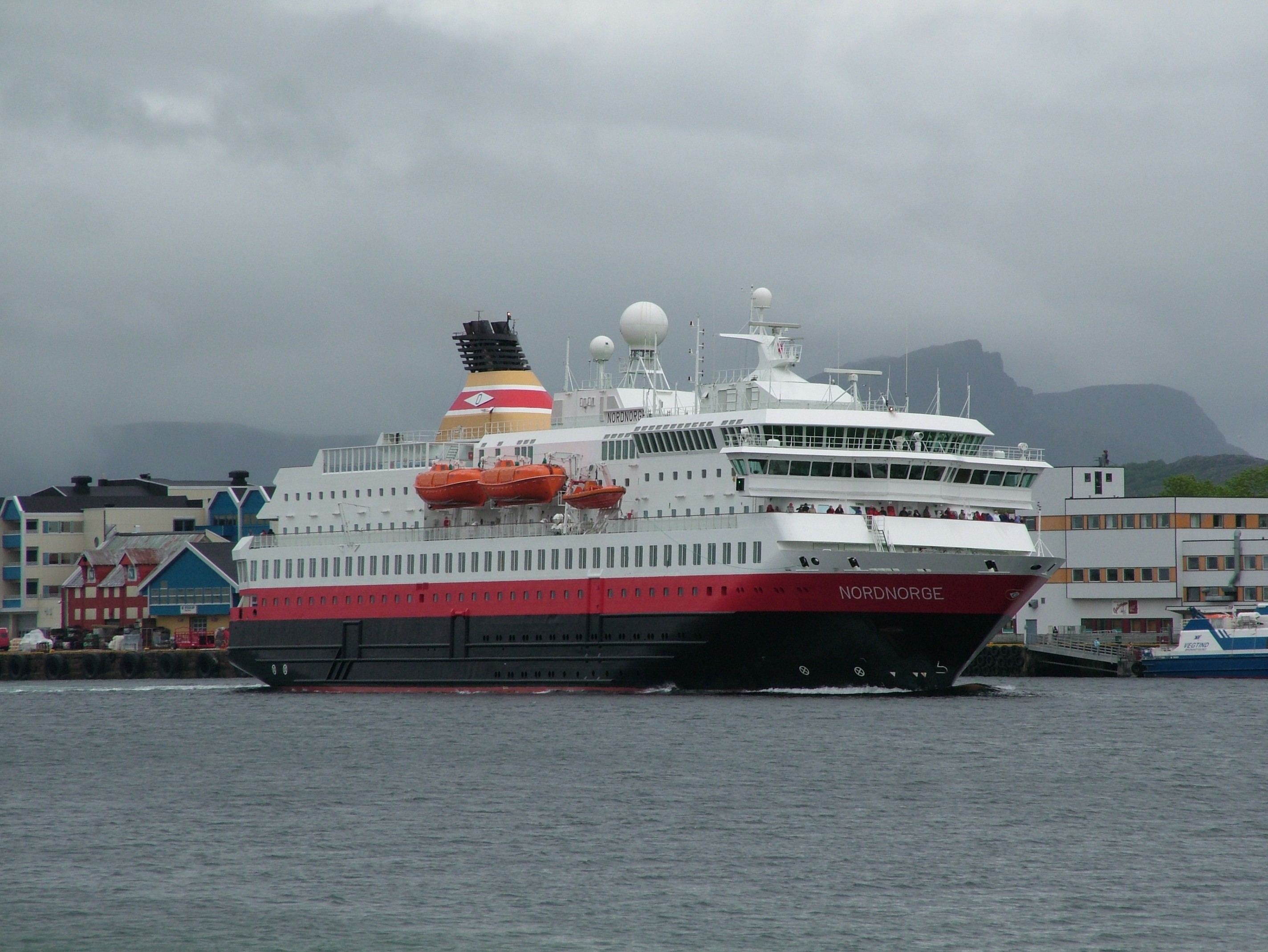 MS Nordnorge, ein Hurtigruten Schiff in Brønnøysund